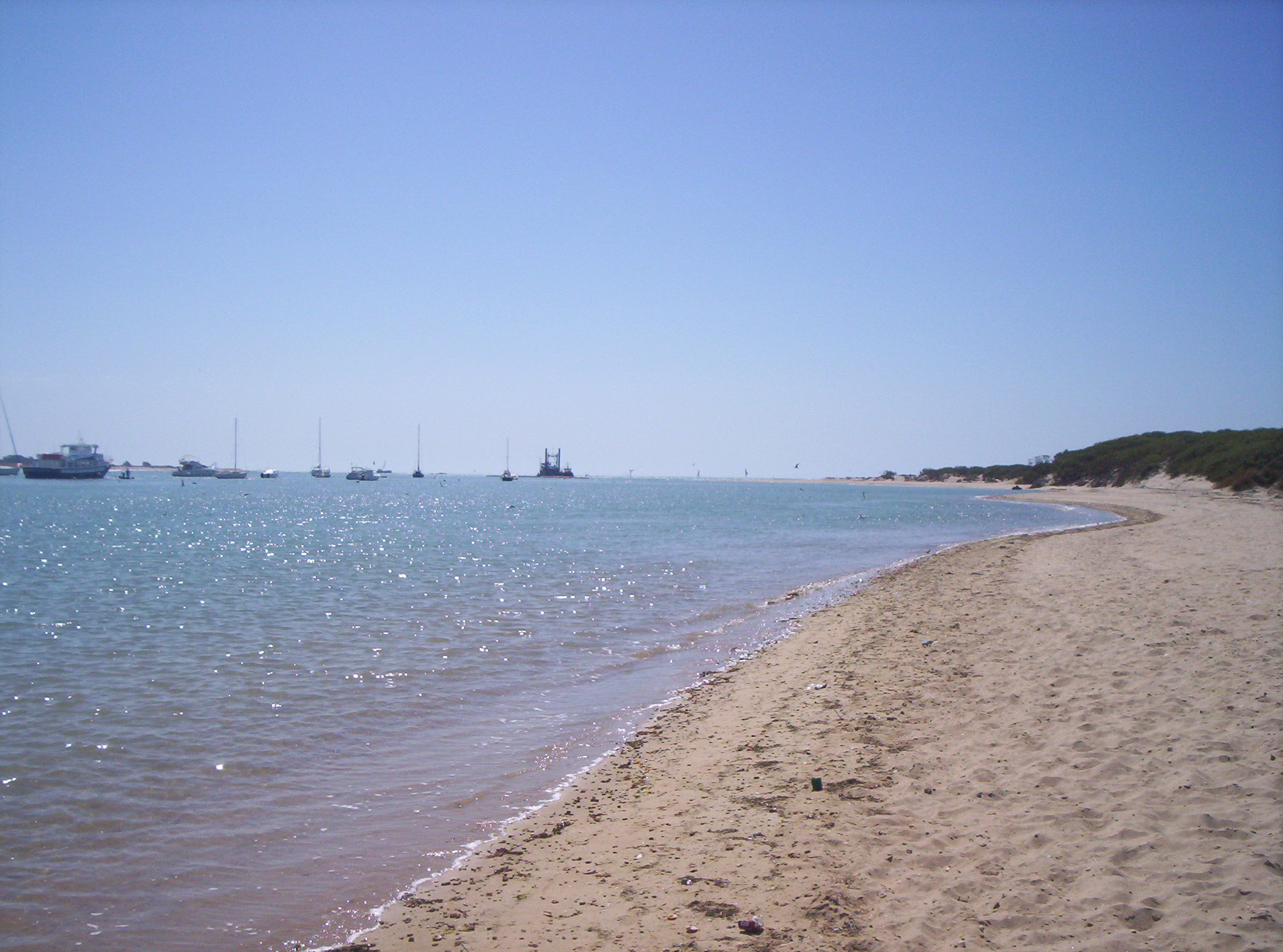 Foto de la desembocadura del caño de Sancti Petri (Cádiz, España).